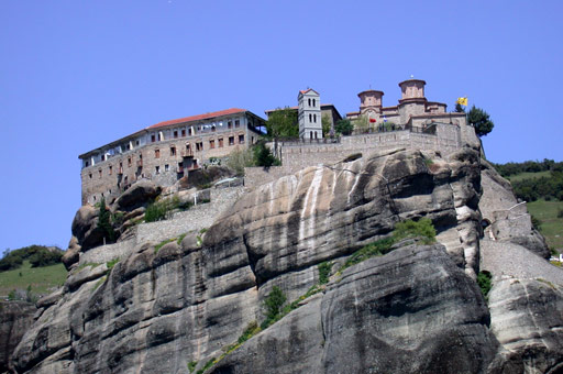 Description : Météores, monastère de Varlaam Date : 14 avril 2004 Auteur : Ifernyen Source : Archives personnelles Statut : GFDL Ifernyen